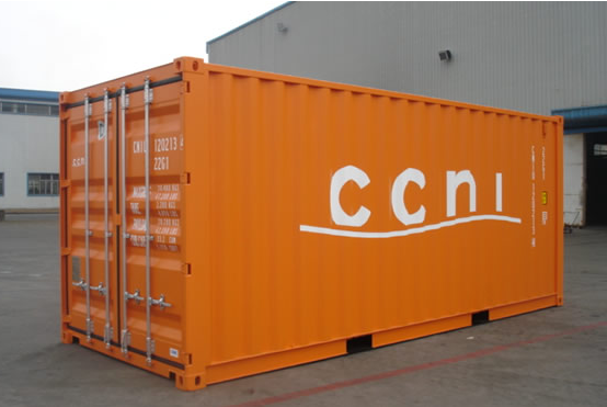 Contenedor Seco CCNI